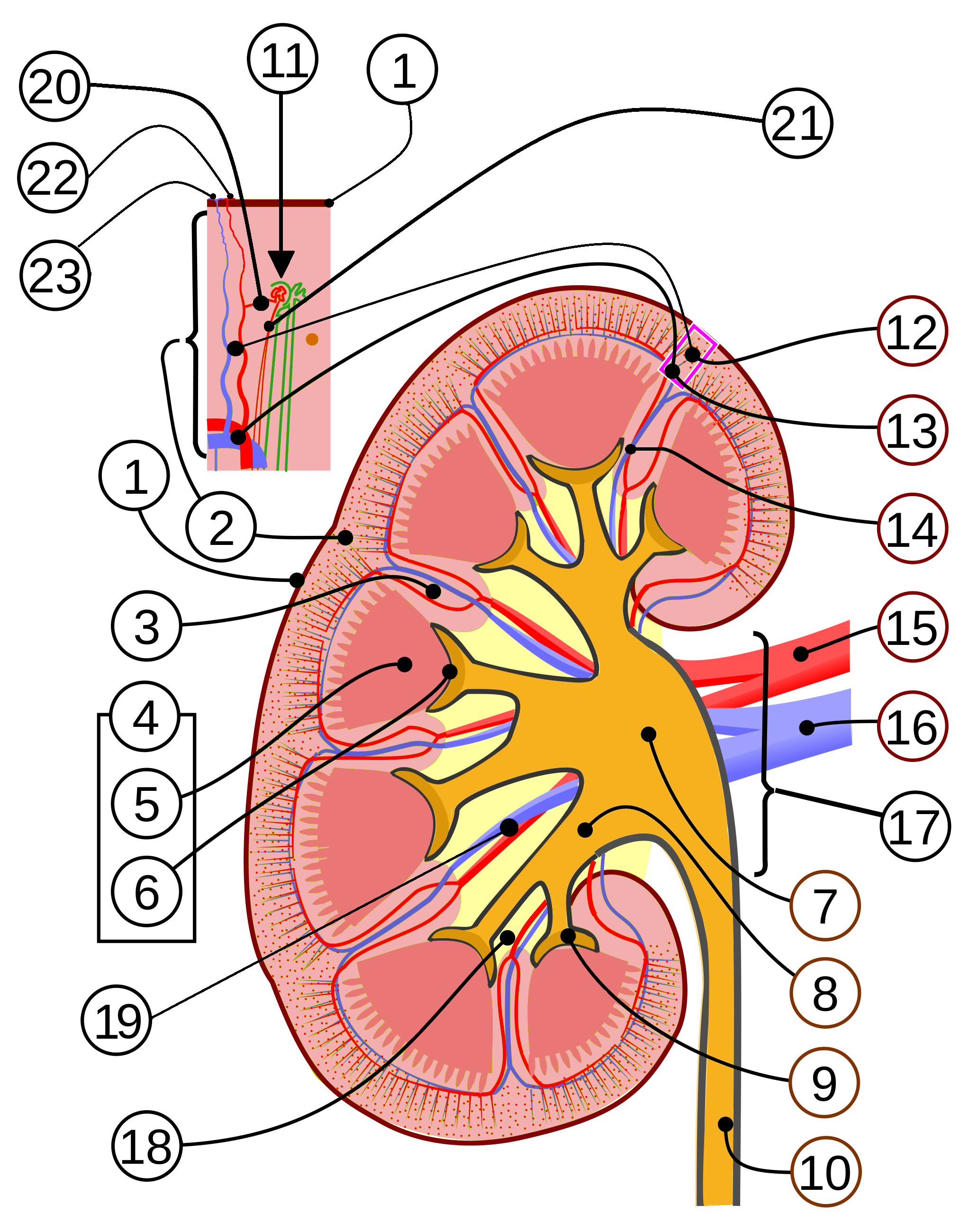 Anatomia do rim